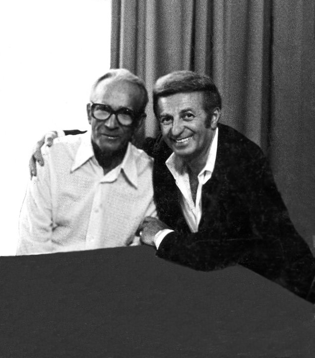 ג'ק אייזנר עם פראנק מאלצ'בסקי